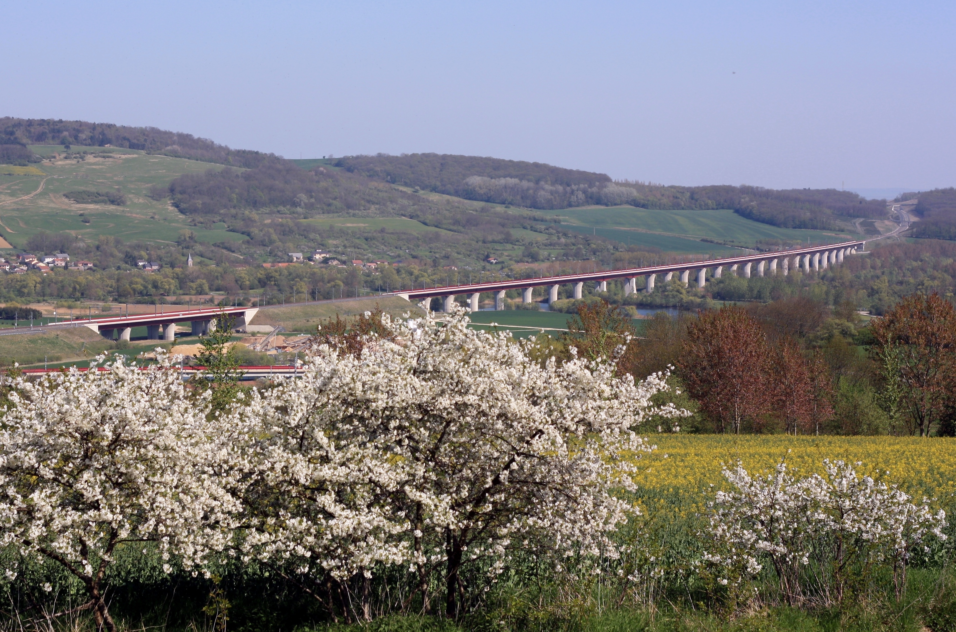 Vandières: le viaduc